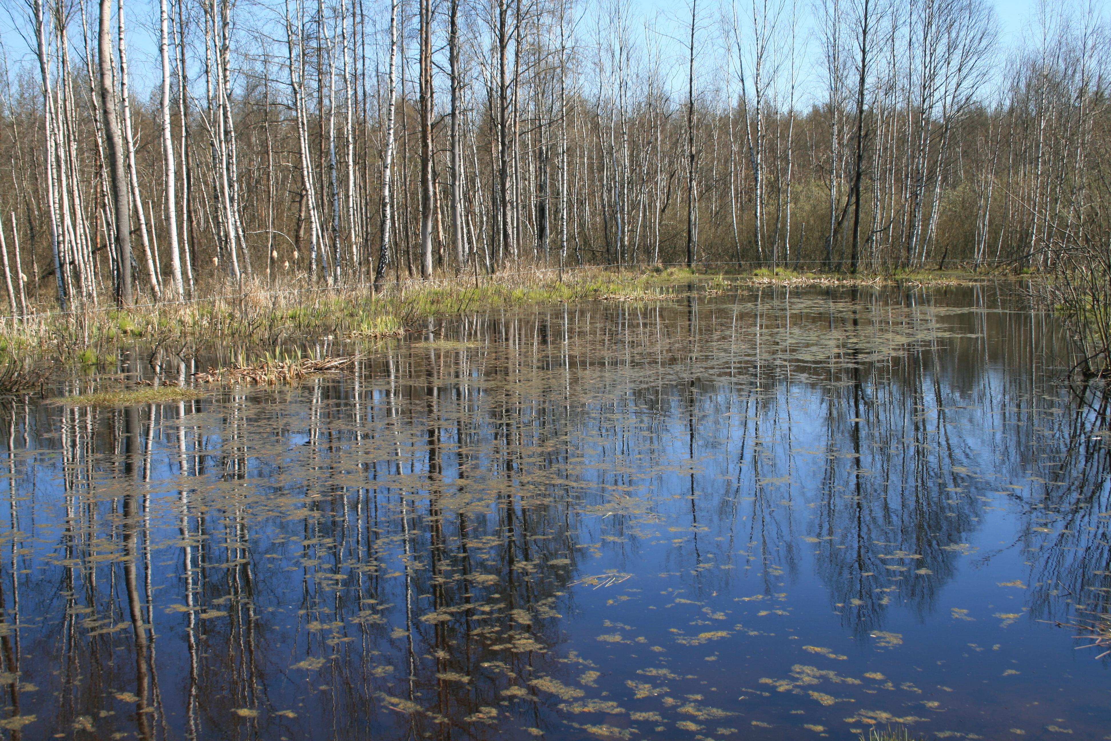 Kučiuliškės draustinis, Lithuania